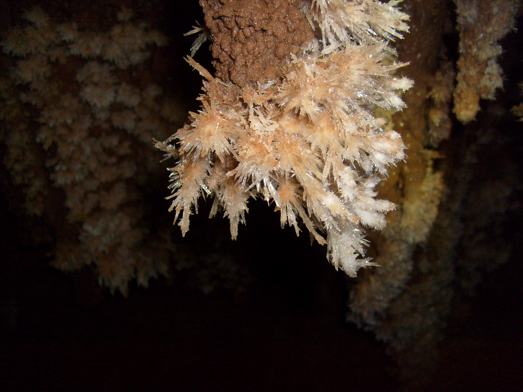 Photo d'une Aragonite - Grottes de Presque - Saint-Médard de Presque.